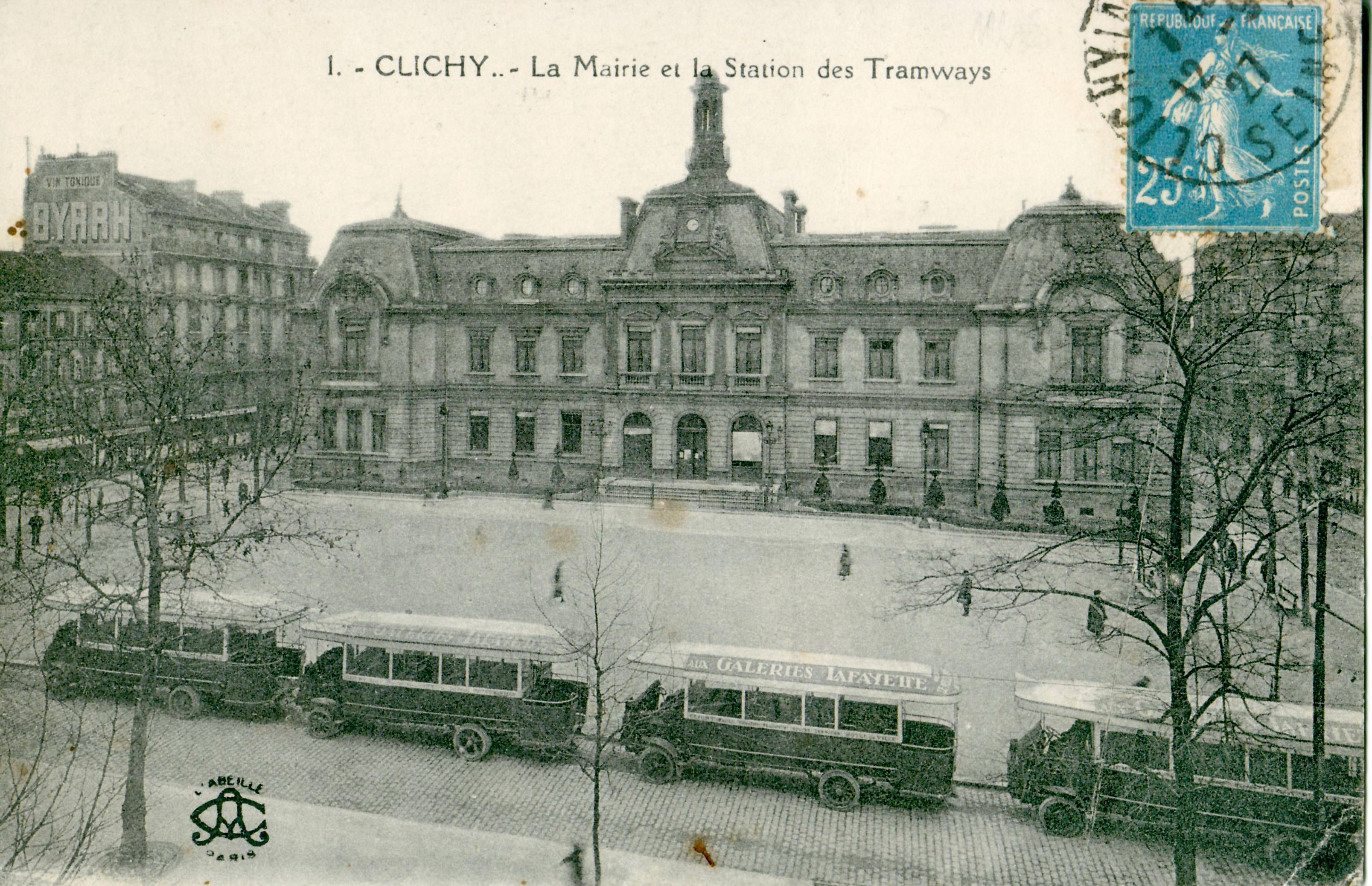 Carte postale ancienne éditée par Abeille à Paris, n°1CLICHY - La Mairie et la station des tramways